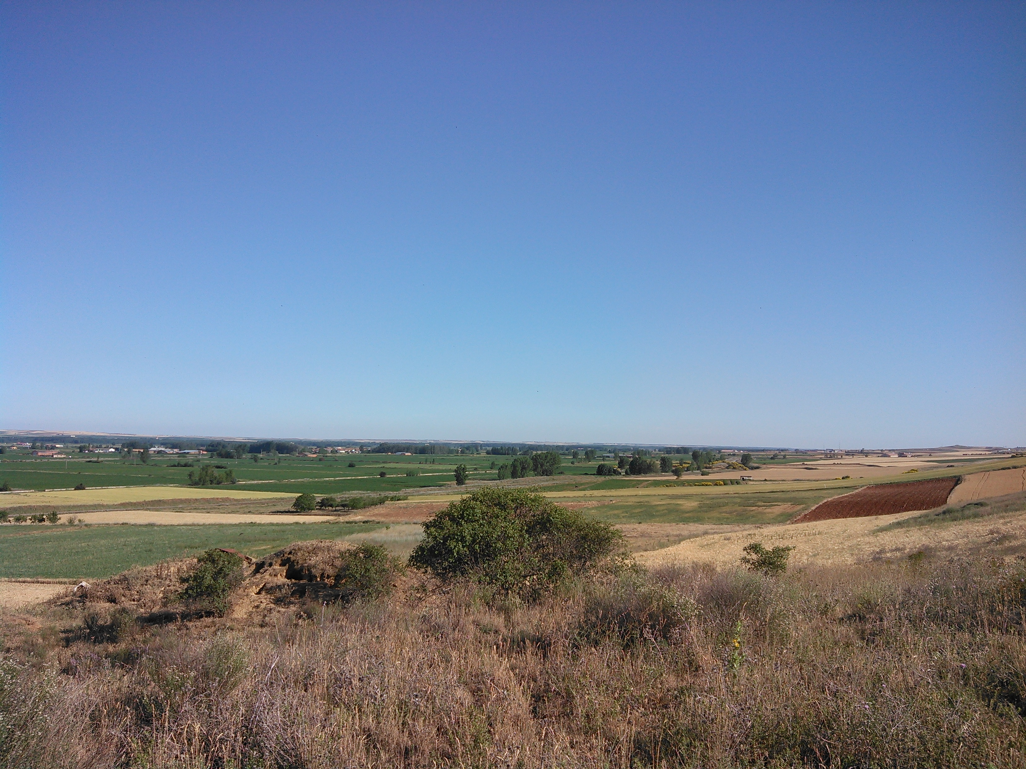 Paisaje de la Vega de Toral. Fotografía tomada desde la zona de las Bodegas de Villademor de la Vega.